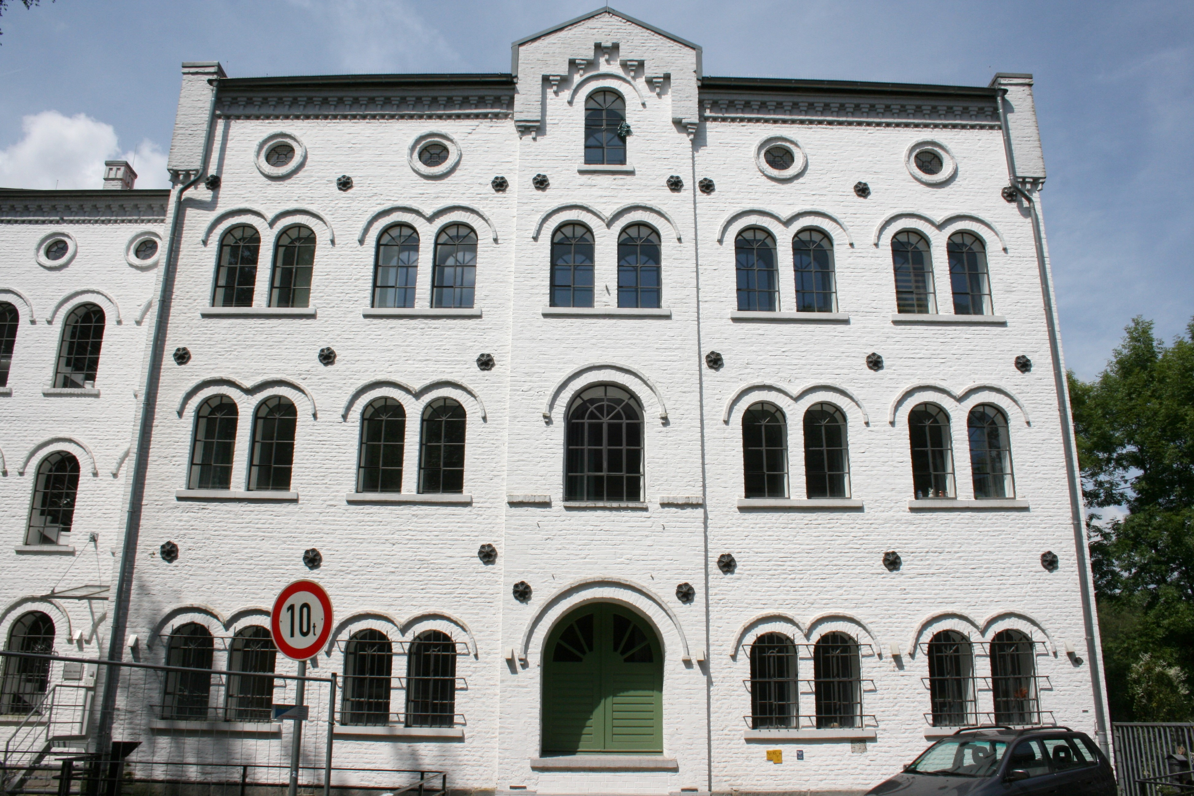 Weiße Mühle auf der Brehminsel in Essen-Werden